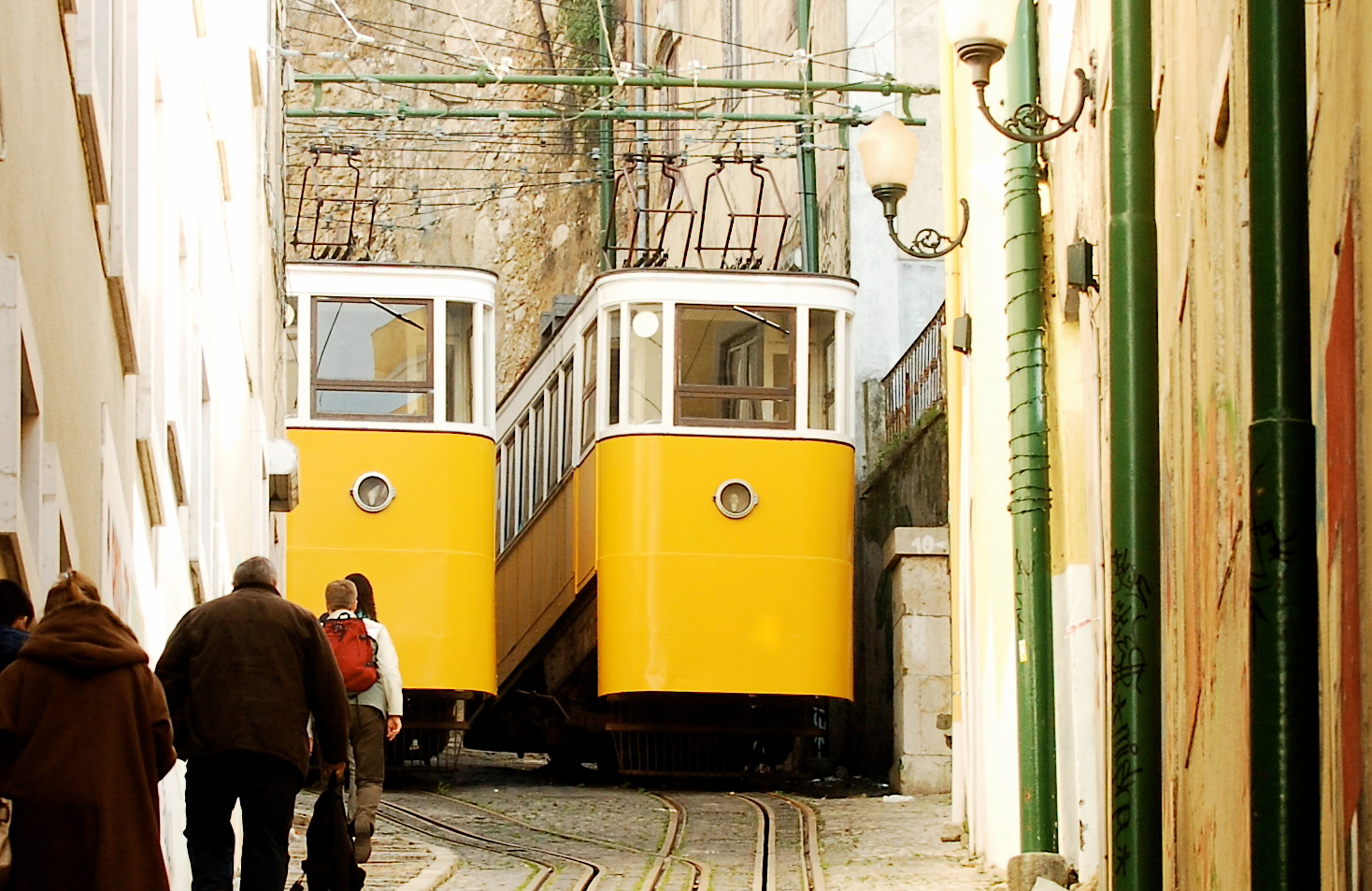 Elevador do Lavra: ambas cabinas na mesma posição (paradas, parece) e pessoal a subir a calçada.